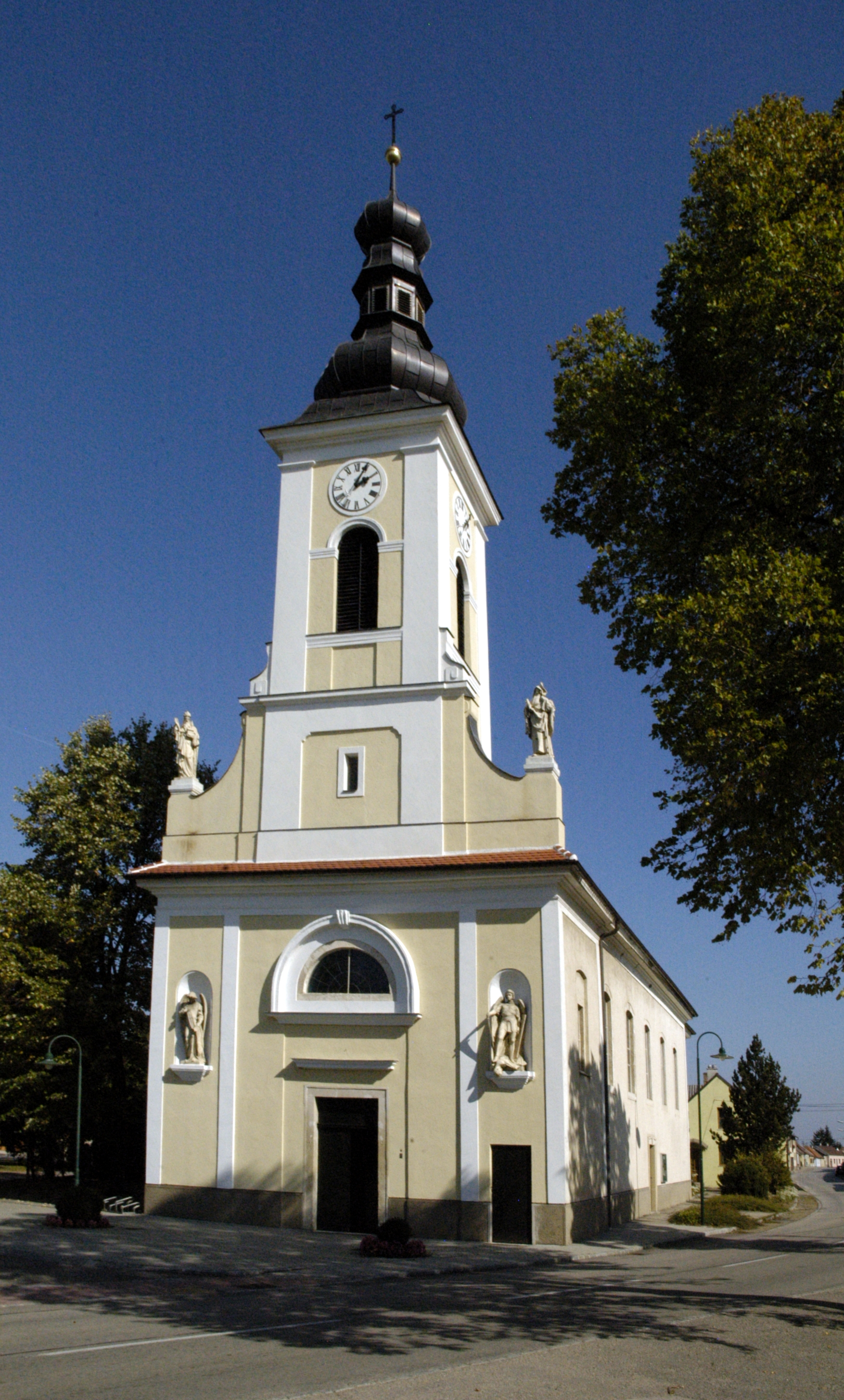 katholische Pfarrkirche Maria Himmelfahrt in Obritz, Gemeinde Hadres